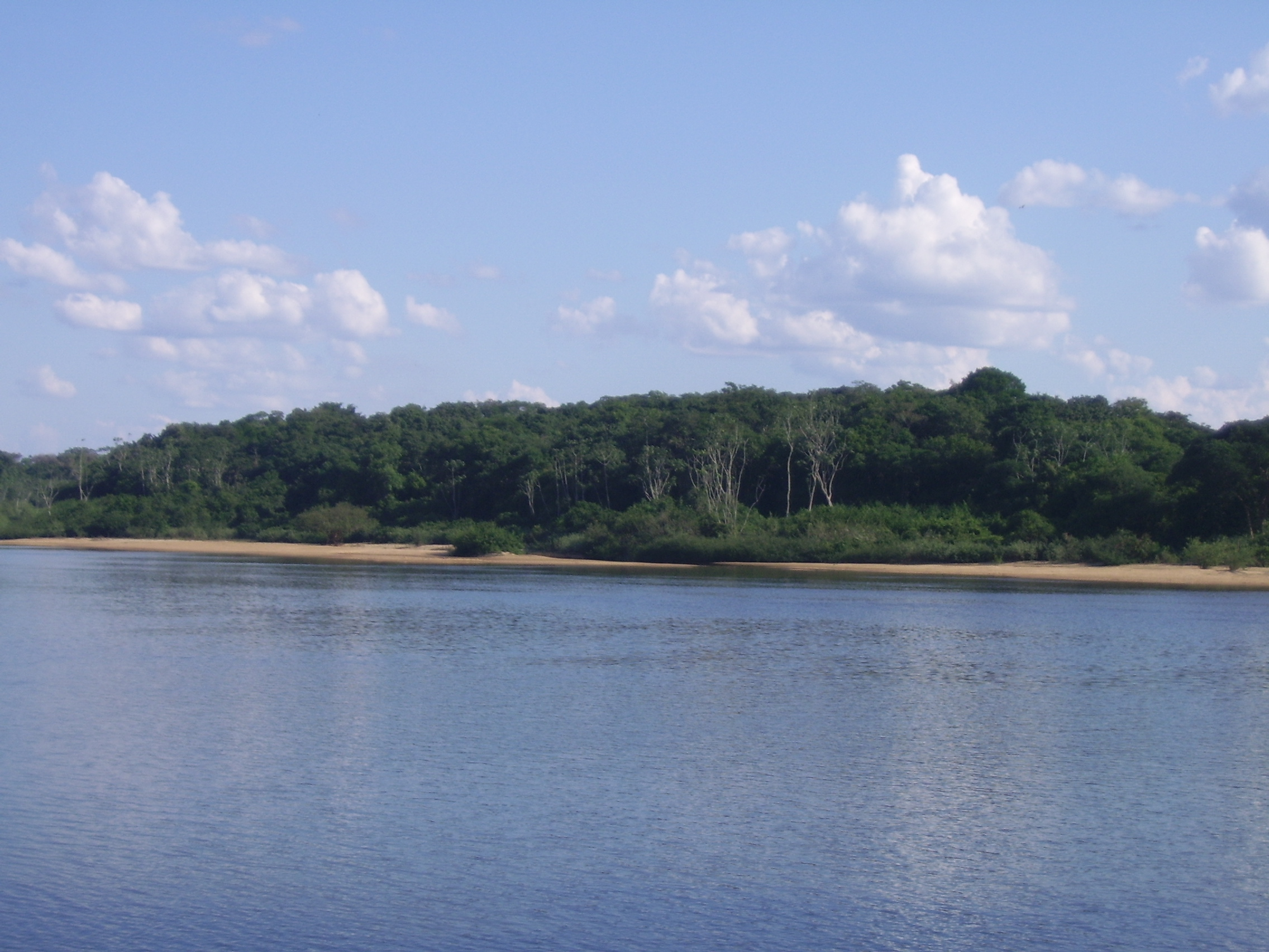 Vista Panorãmica da Prainha.